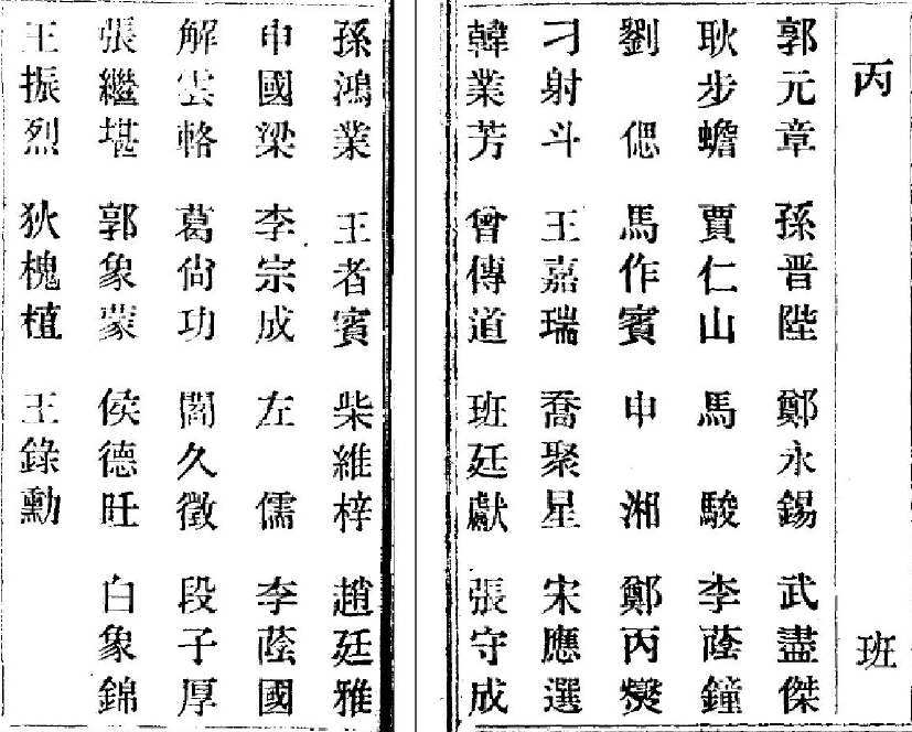 西學專齋學生